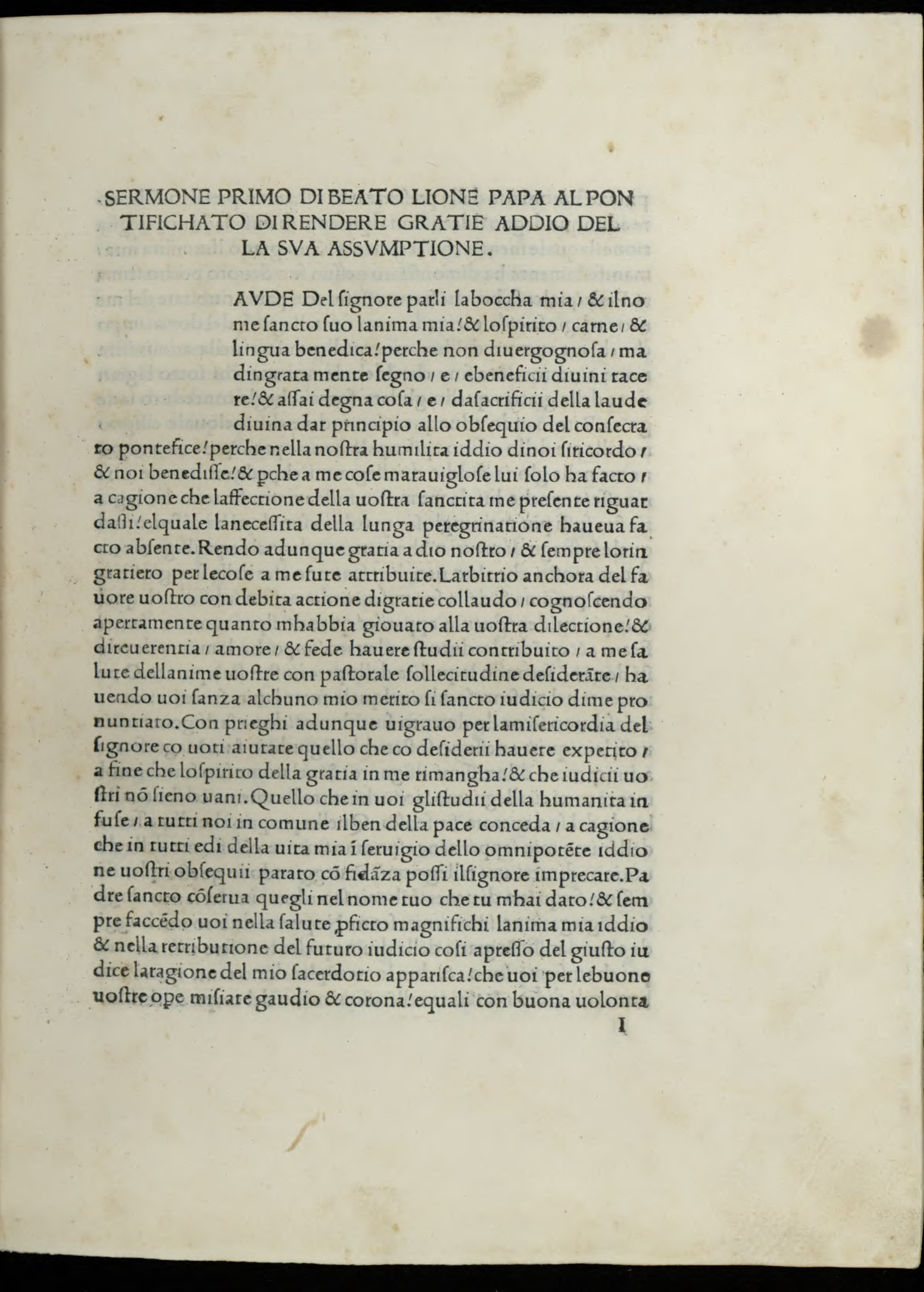 Sermones (italiano). - Impresso in Firenze : [Antonio Miscomini], adi XXI di maggio MCCCCLXXXV. - 174 c. ; [a⁴, b-x⁸, y¹⁰] ; 4º .